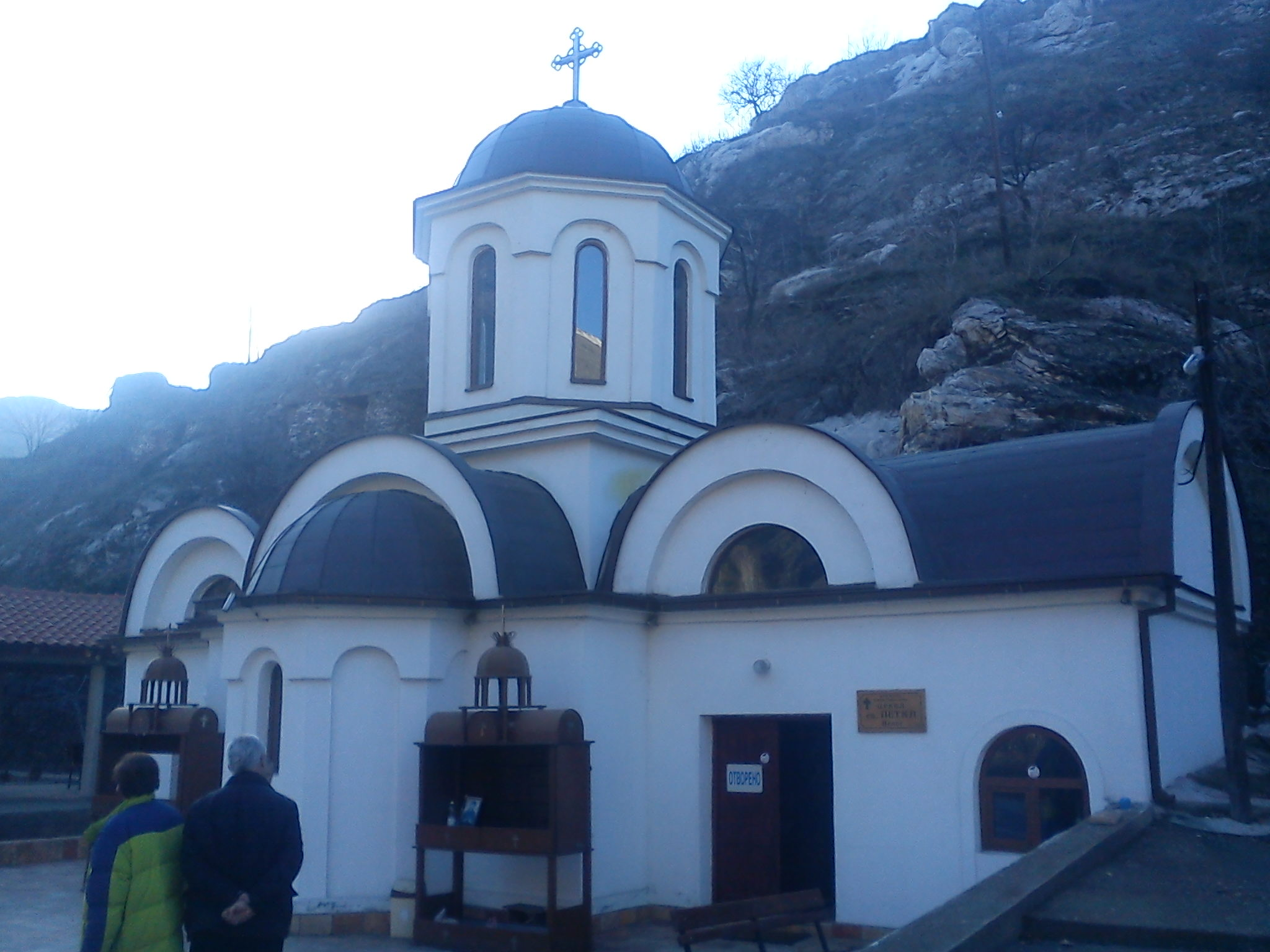 Црквата Света Петка во Велес